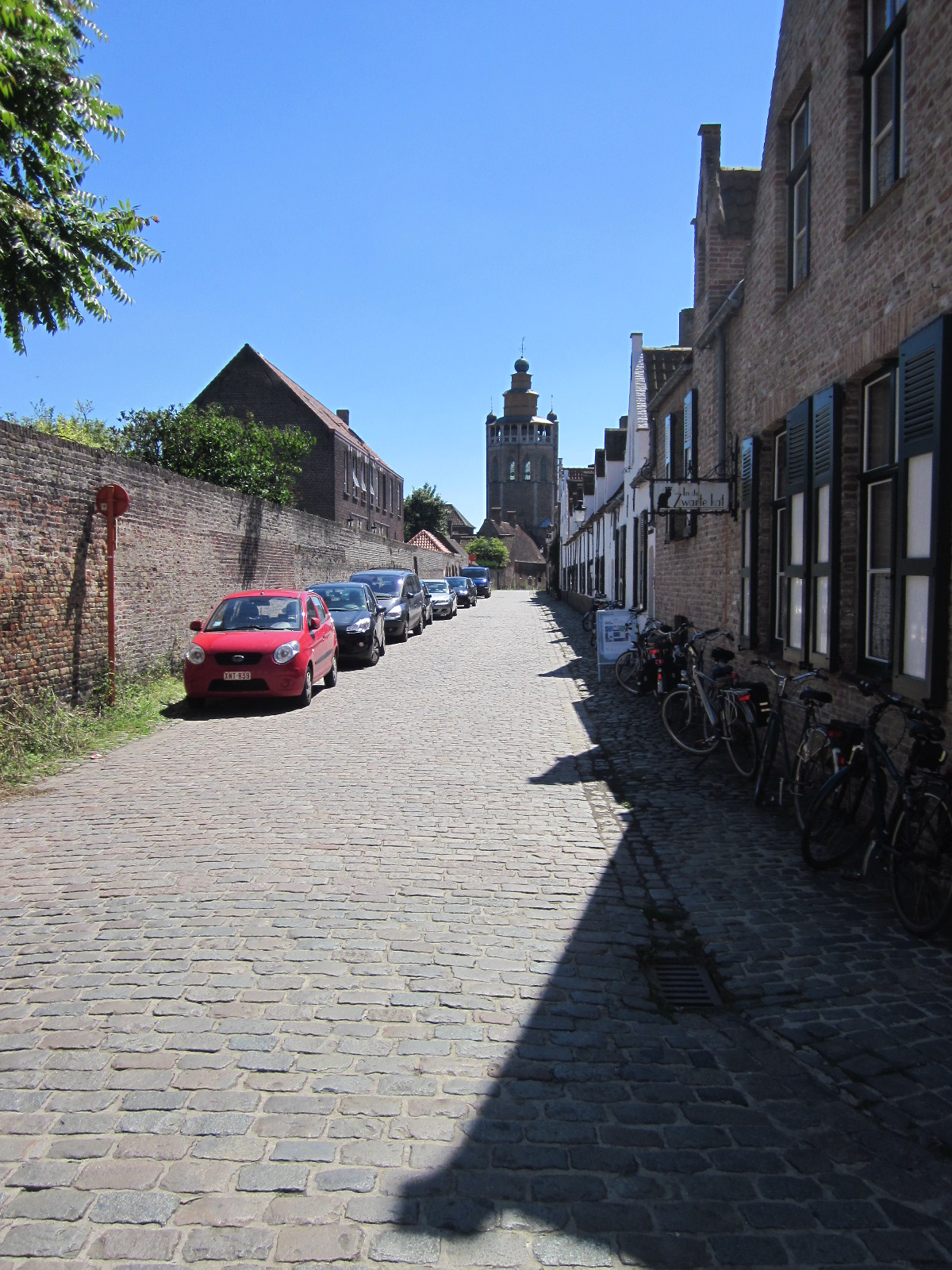 Museum voor Volkskunde, Balstraat 43-45 in Brugge 38″ N, 3° 13′ 59.3″ E